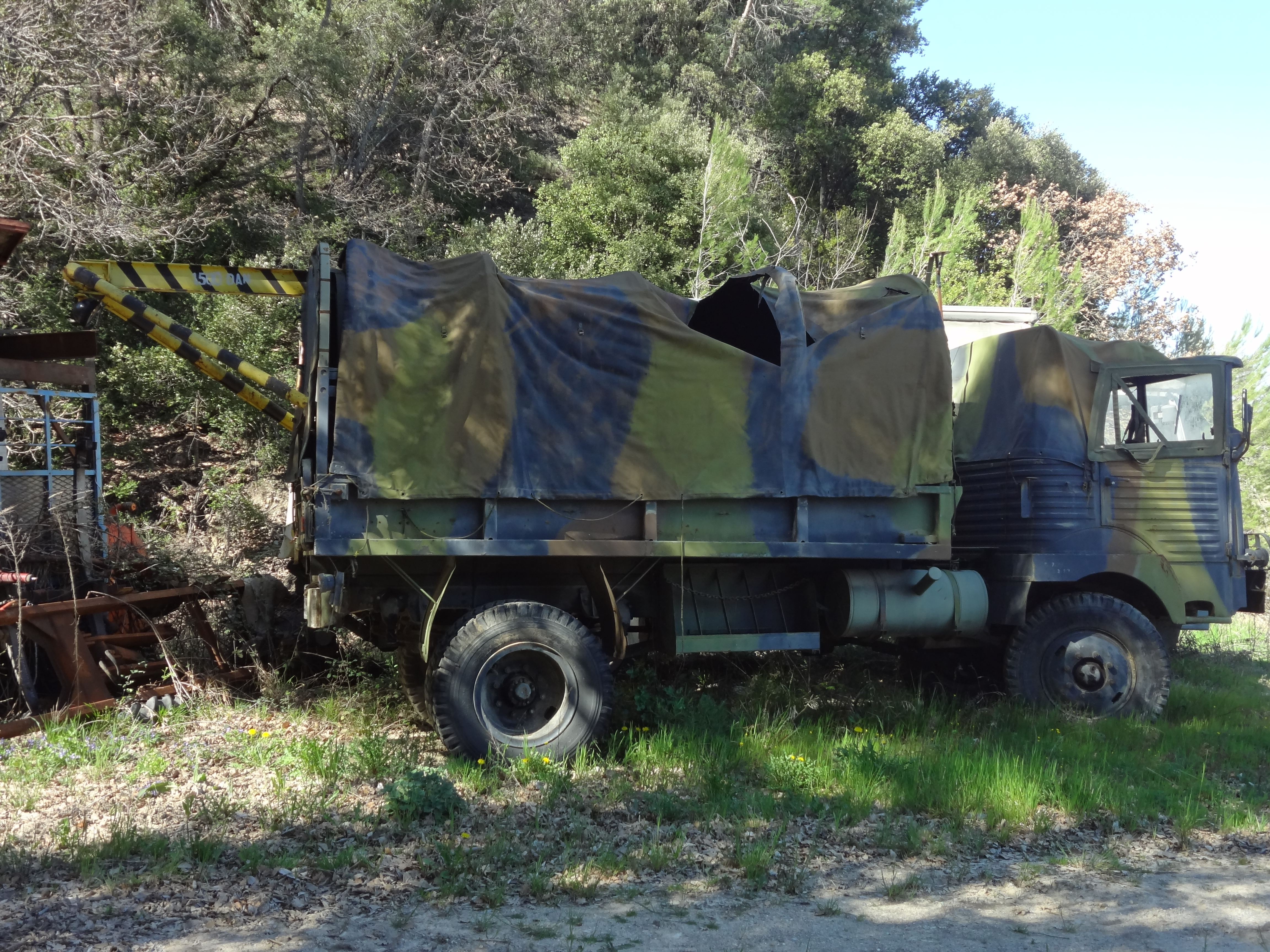 Camion Simca Cargo 4x4 version dépanneuse, stationné à Lurs (Alpes-de-Haute-Provence)